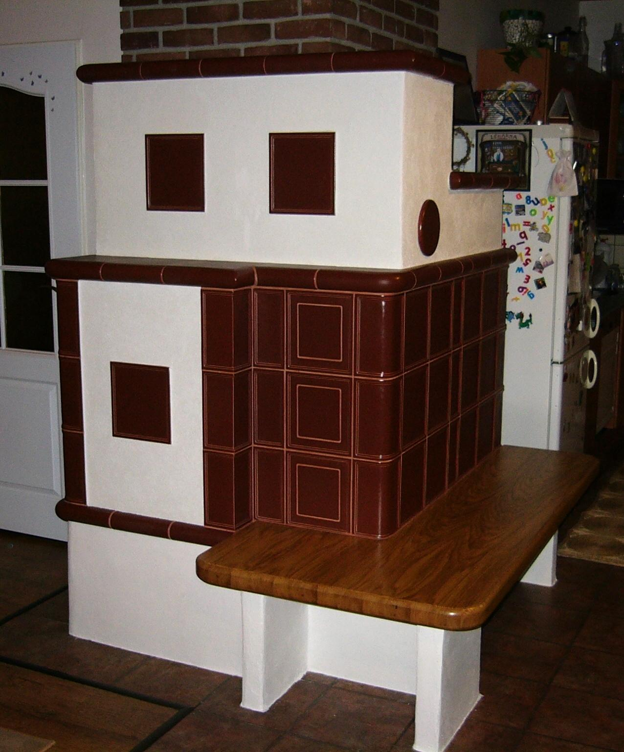 Současná kachlová kamna